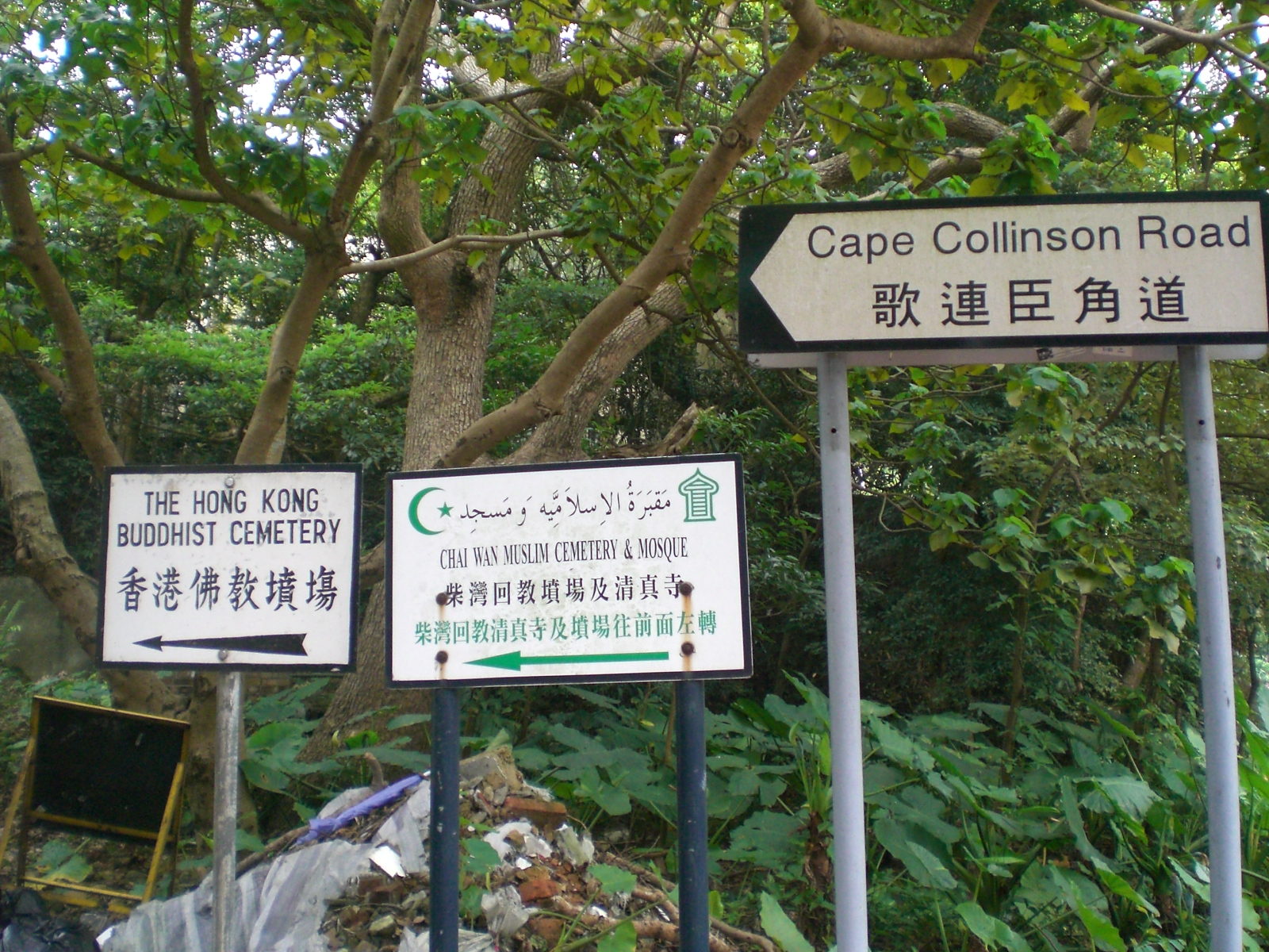 哥連臣角 Cape Collinson（或寫作歌連臣角，古稱黑角頭）是zh:香港的一個地方，位於zh:香港島東部，柴灣及zh:小西灣以南，大浪灣以北的地方。 Photo by me.